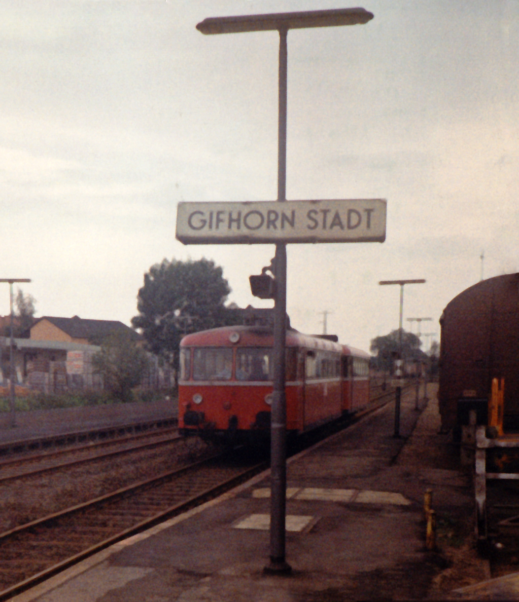 Die Allertalbahn in Gifhorn Stadt 26.09.1981